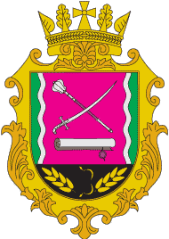 Герб Зборівського району